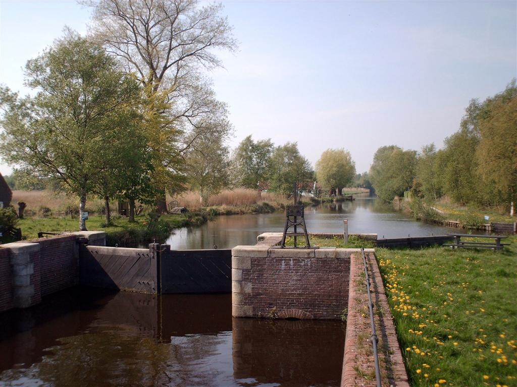 Rottige Meente, natuurgebied in Friesland